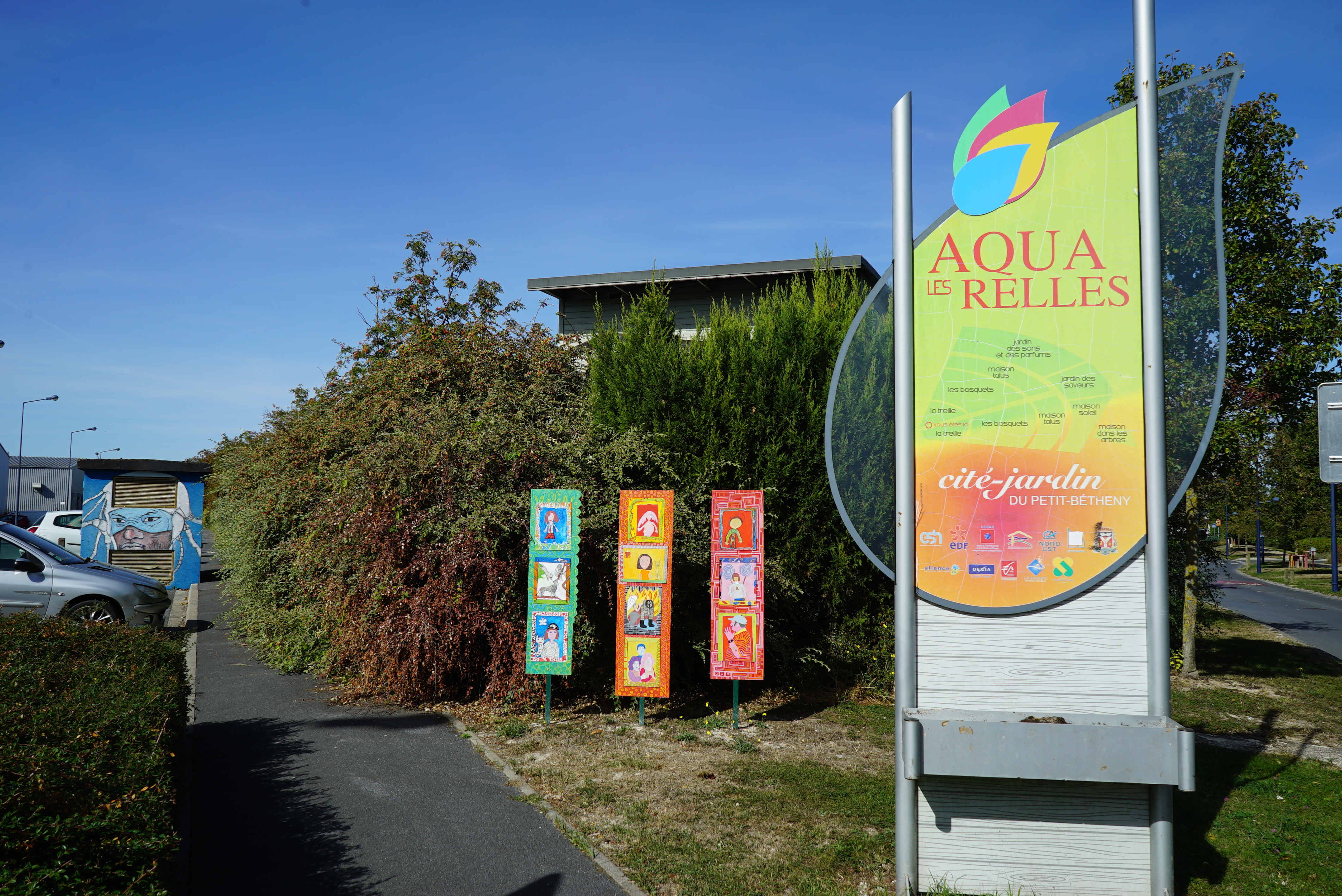 dans le Petit-Bétheny, les DOcks Rémois.